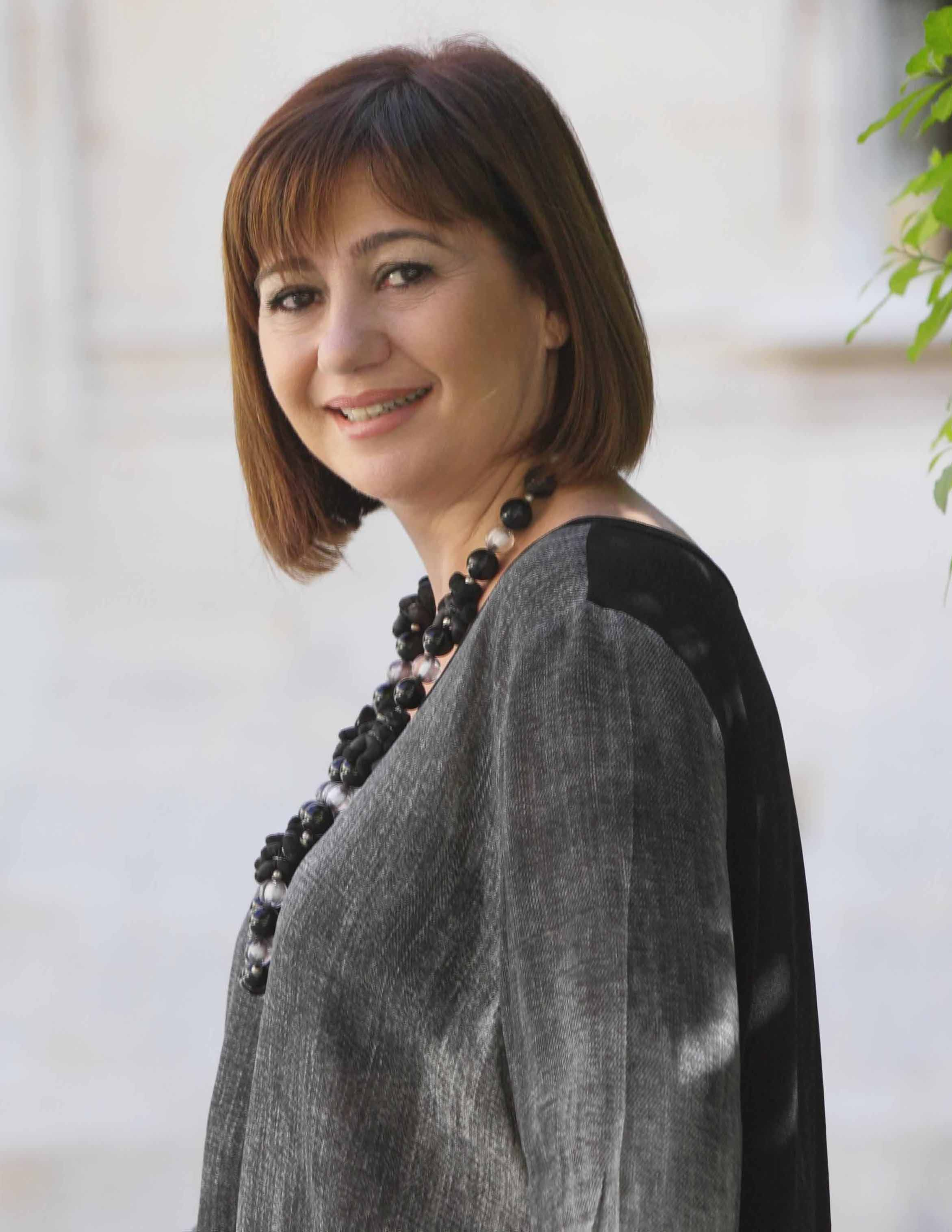 Foto oficial de Francina Armengol, presidenta de les Illes Balears.